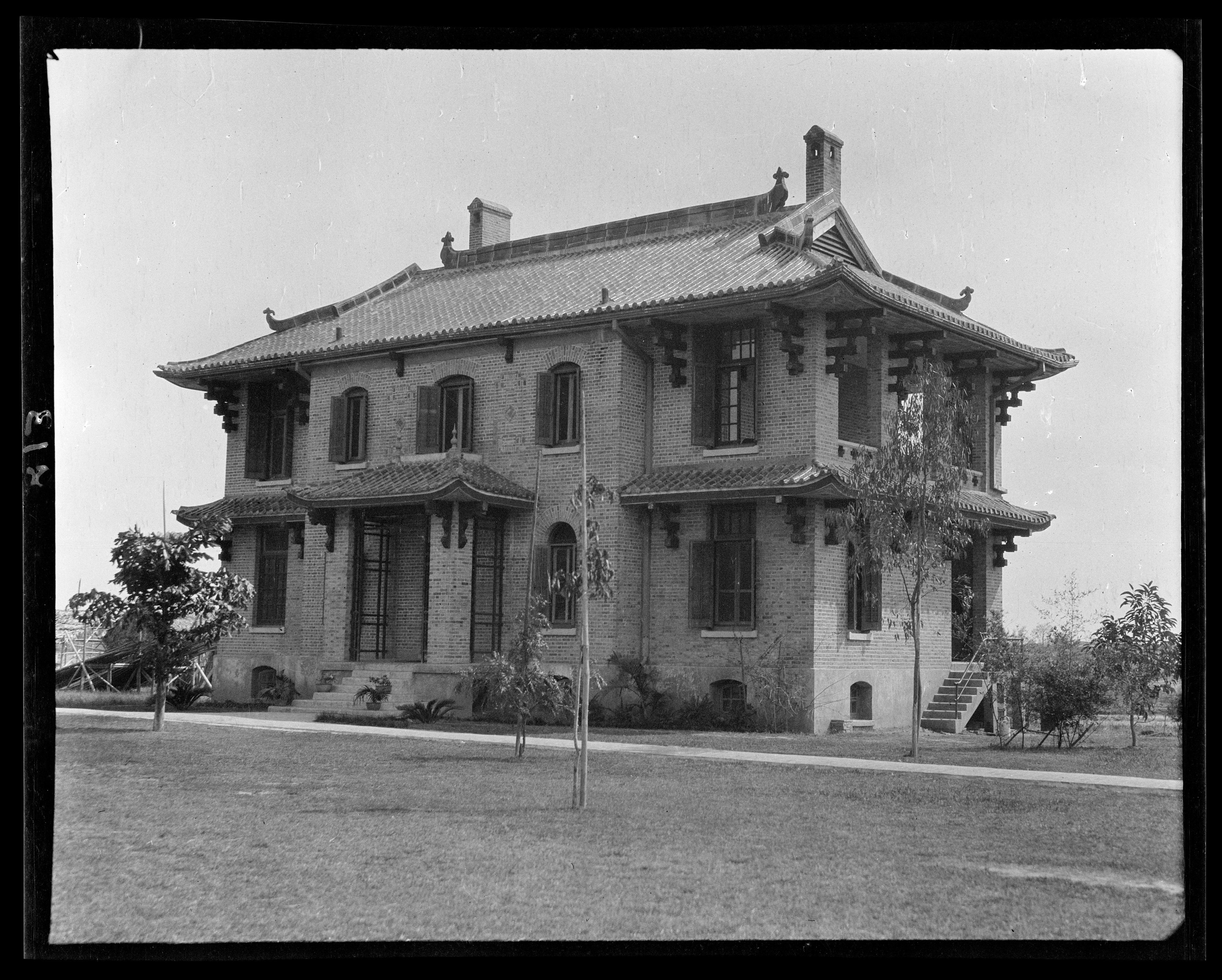 嶺南學校（廣州私立嶺南大學）宿舍